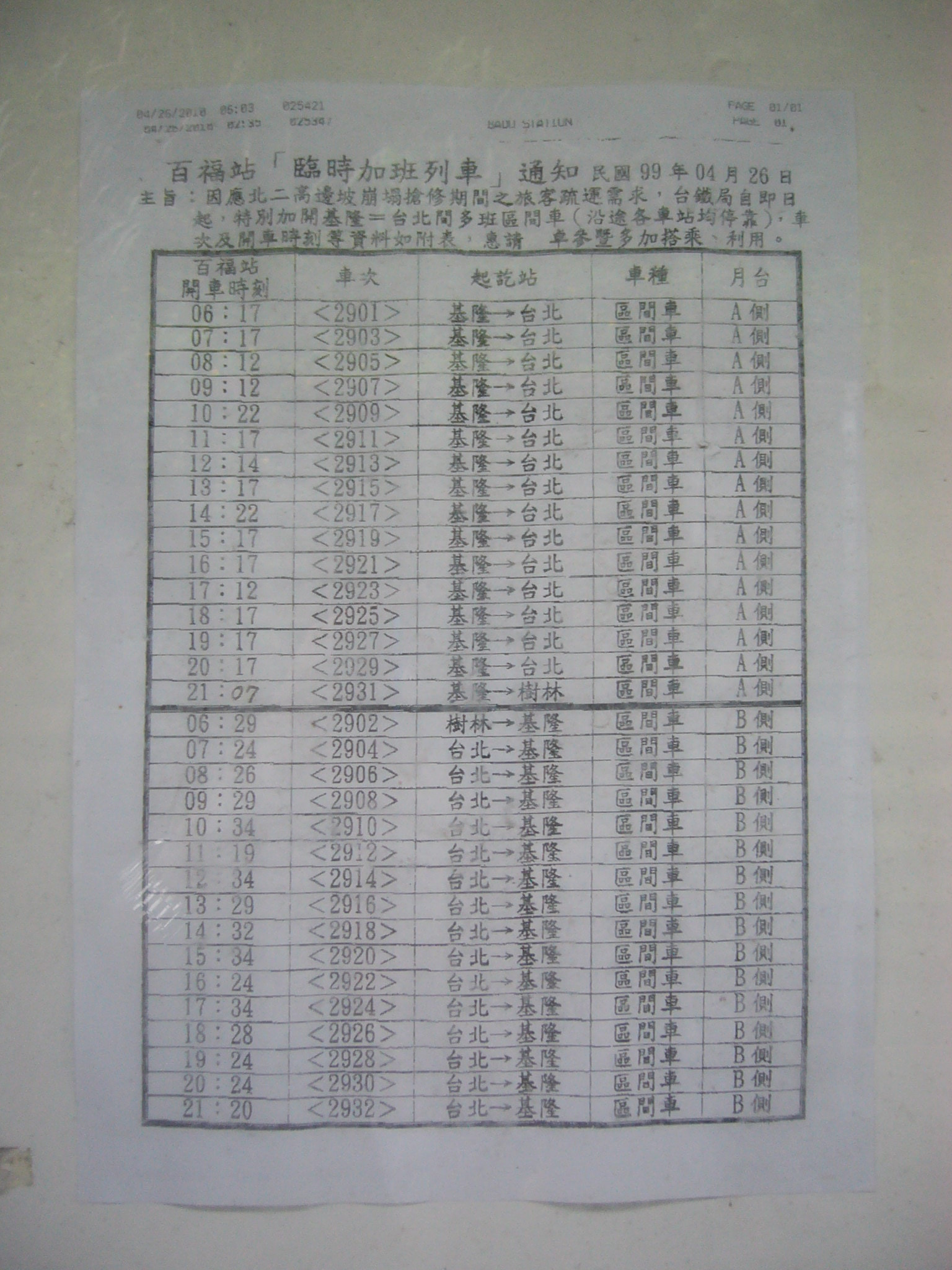 2010年國道三號3.1公里崩塌事件後搶修期間，臺灣鐵路管理局加開基隆－臺北間多班區間車。此為臺灣鐵路管理局百福車站第二月臺公布欄貼出的加開區間車時刻表。